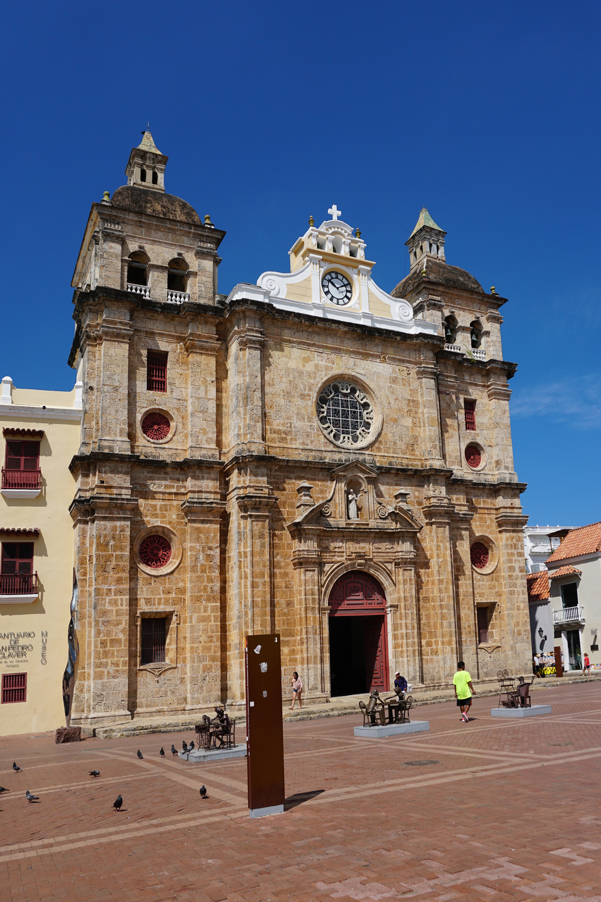 Fachada principal de la Iglesia de San Pedro Claver, Cartagena de Indias